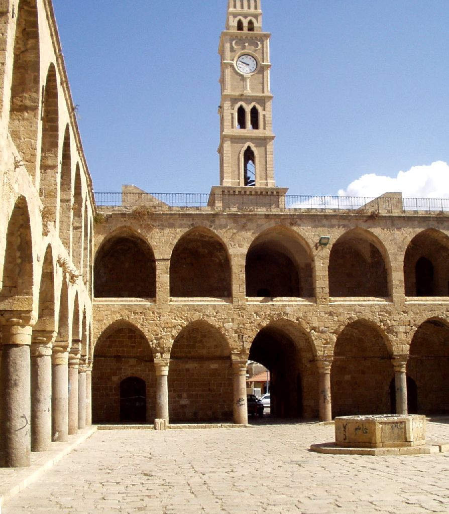 Khan al-Umdan